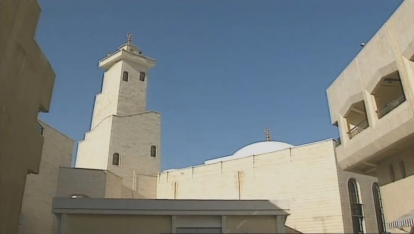 محسجد بن نبهان